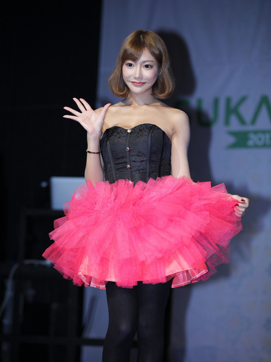 아스카 키라라(Kirara Asuka) 팬미팅